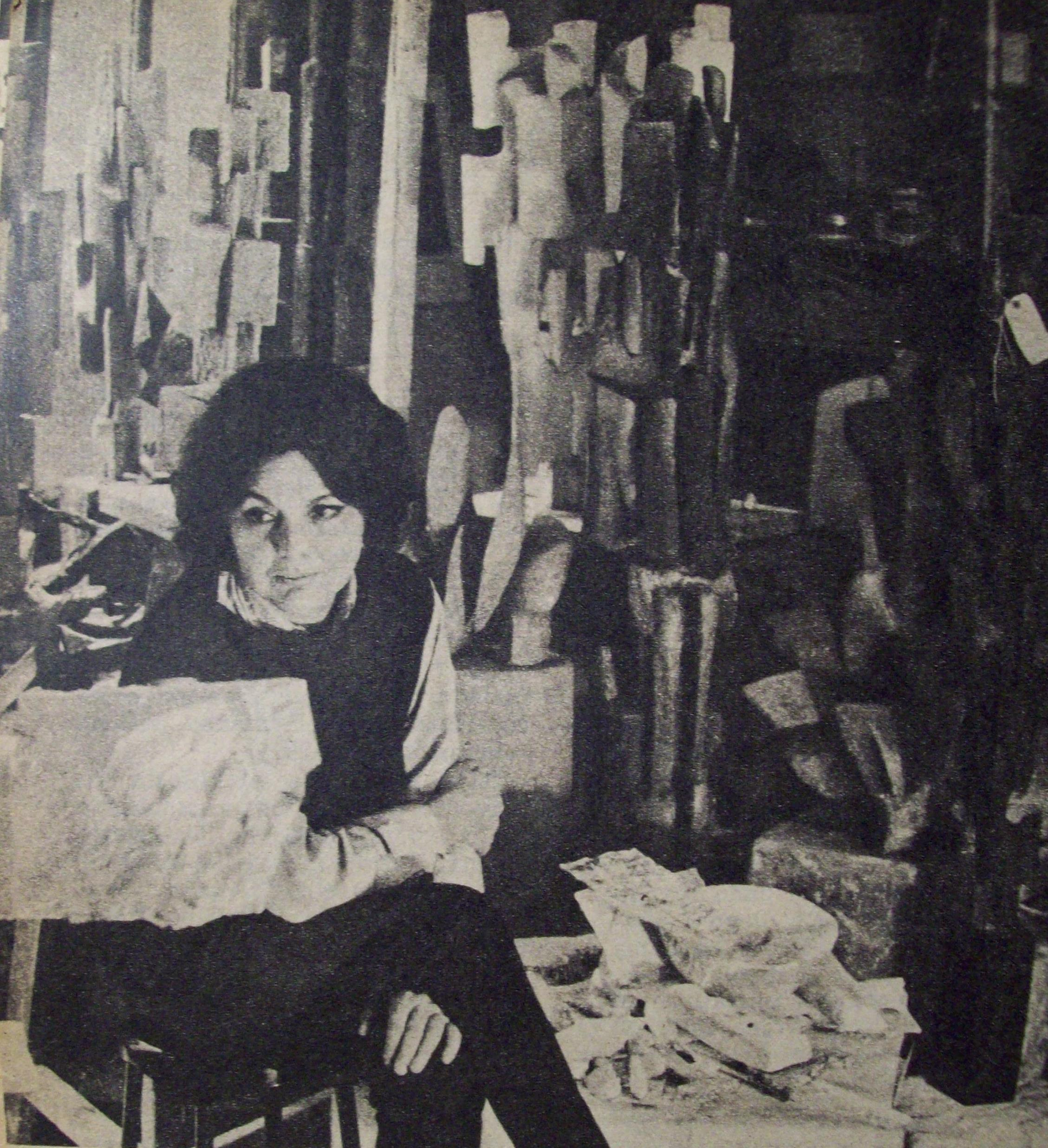 Alicia Penalba, ganadora del Primer Premio Internacional de Escultura.